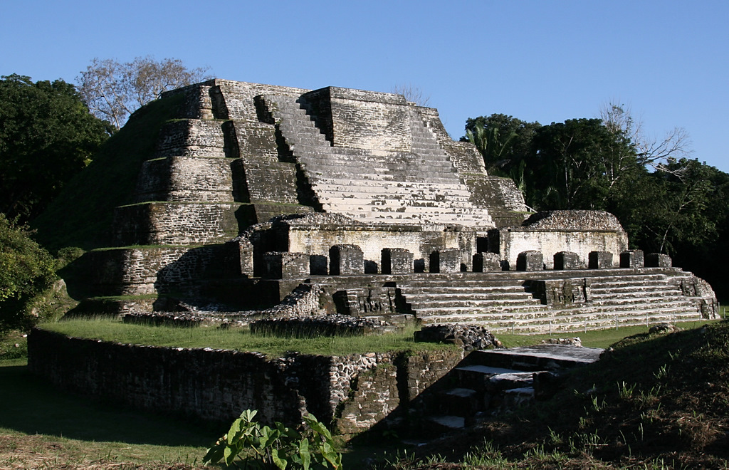 Altun Ha, Mayan temple Belize.